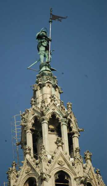 Hoch über Wien: der Rathausmann